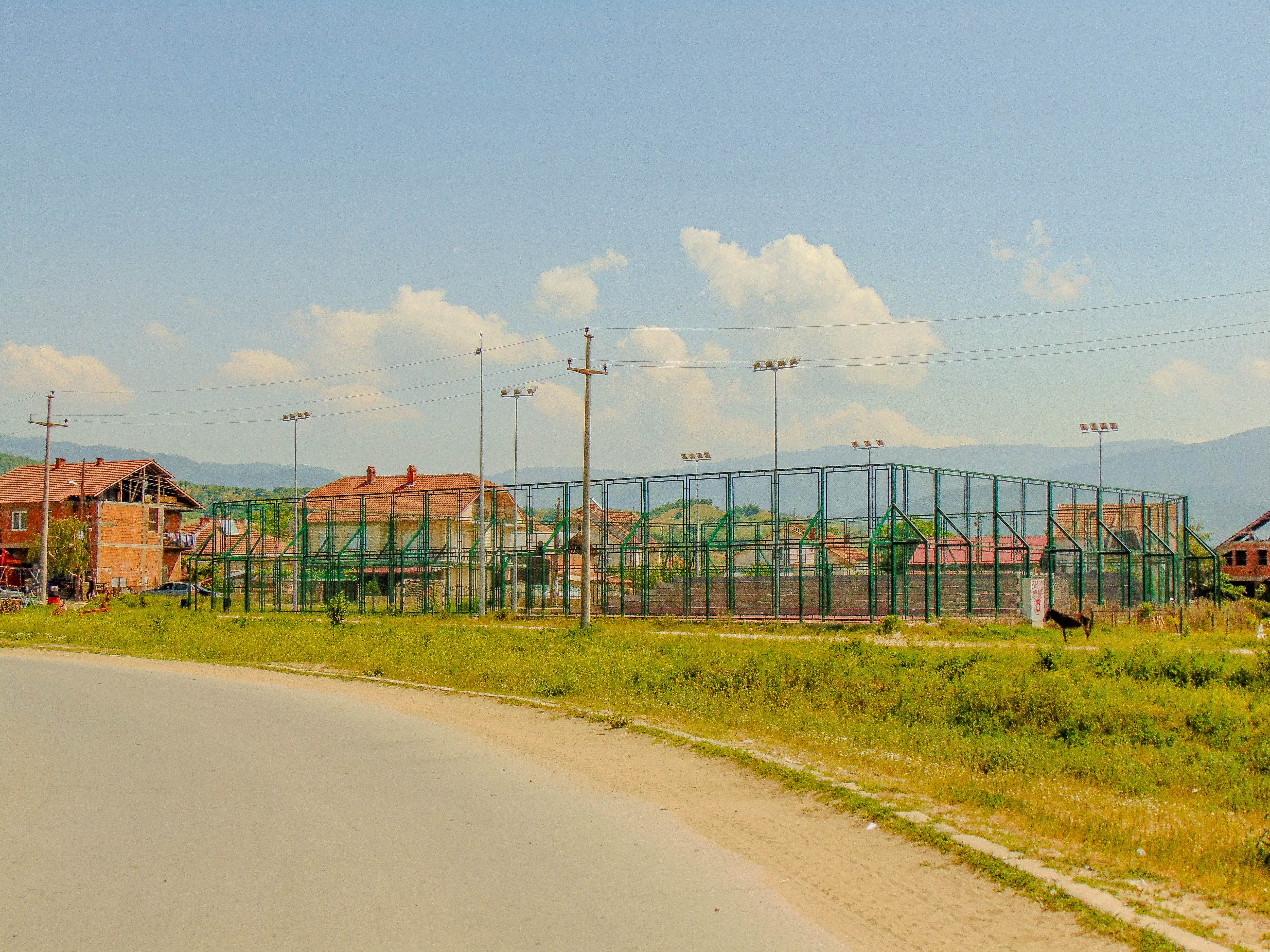 Ораовица